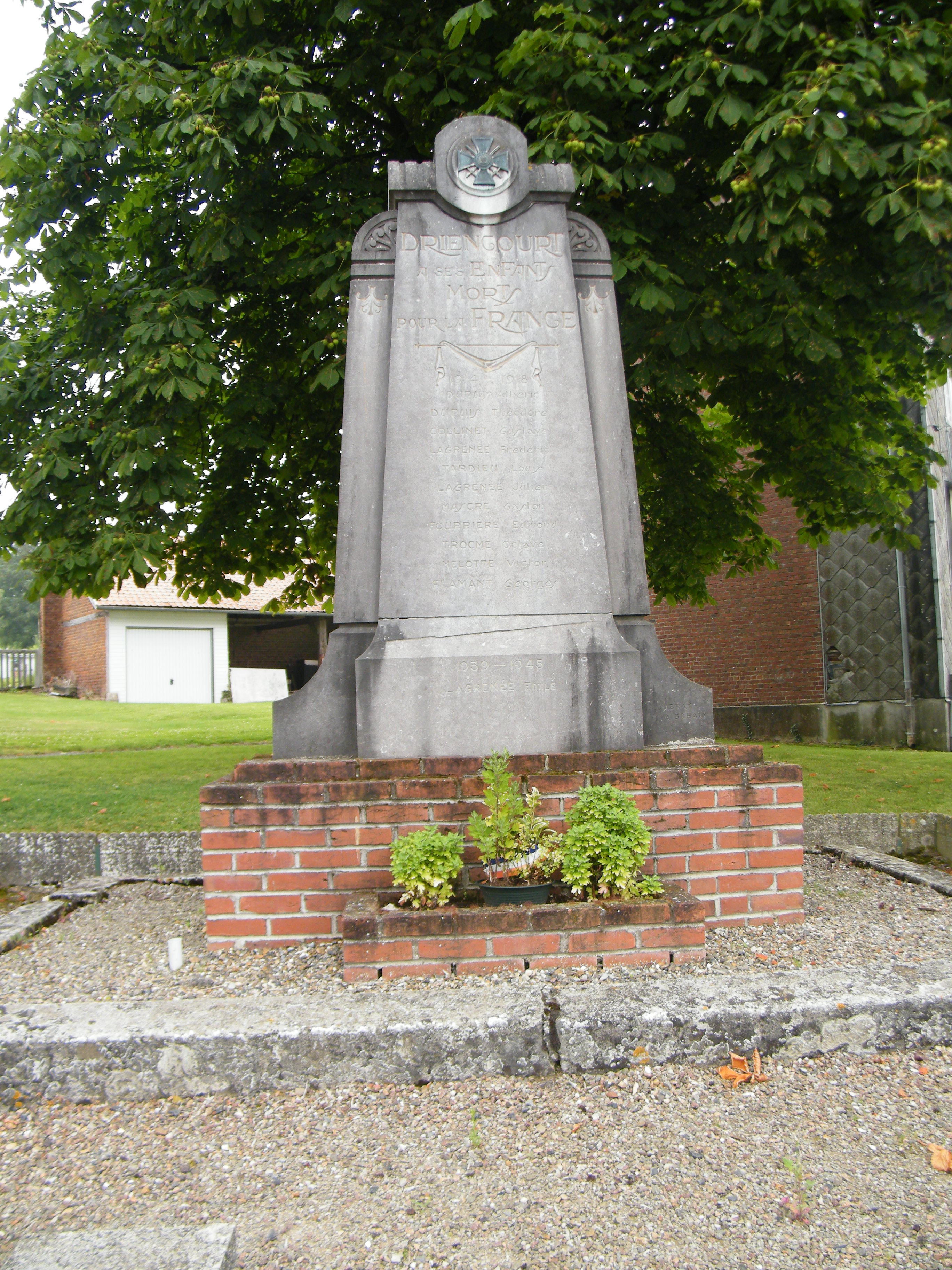 Monument aux morts pour la patrie.